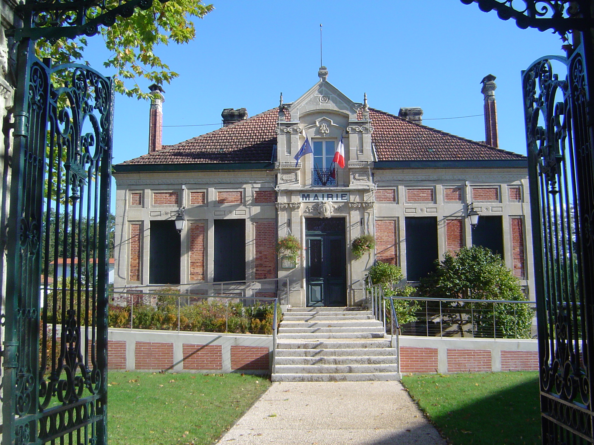 Mairia de Linça; Gasconha